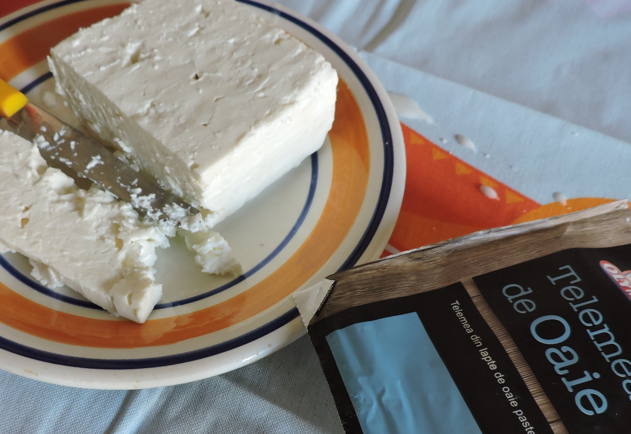 Telemea di pecora (Telemea de oaie)